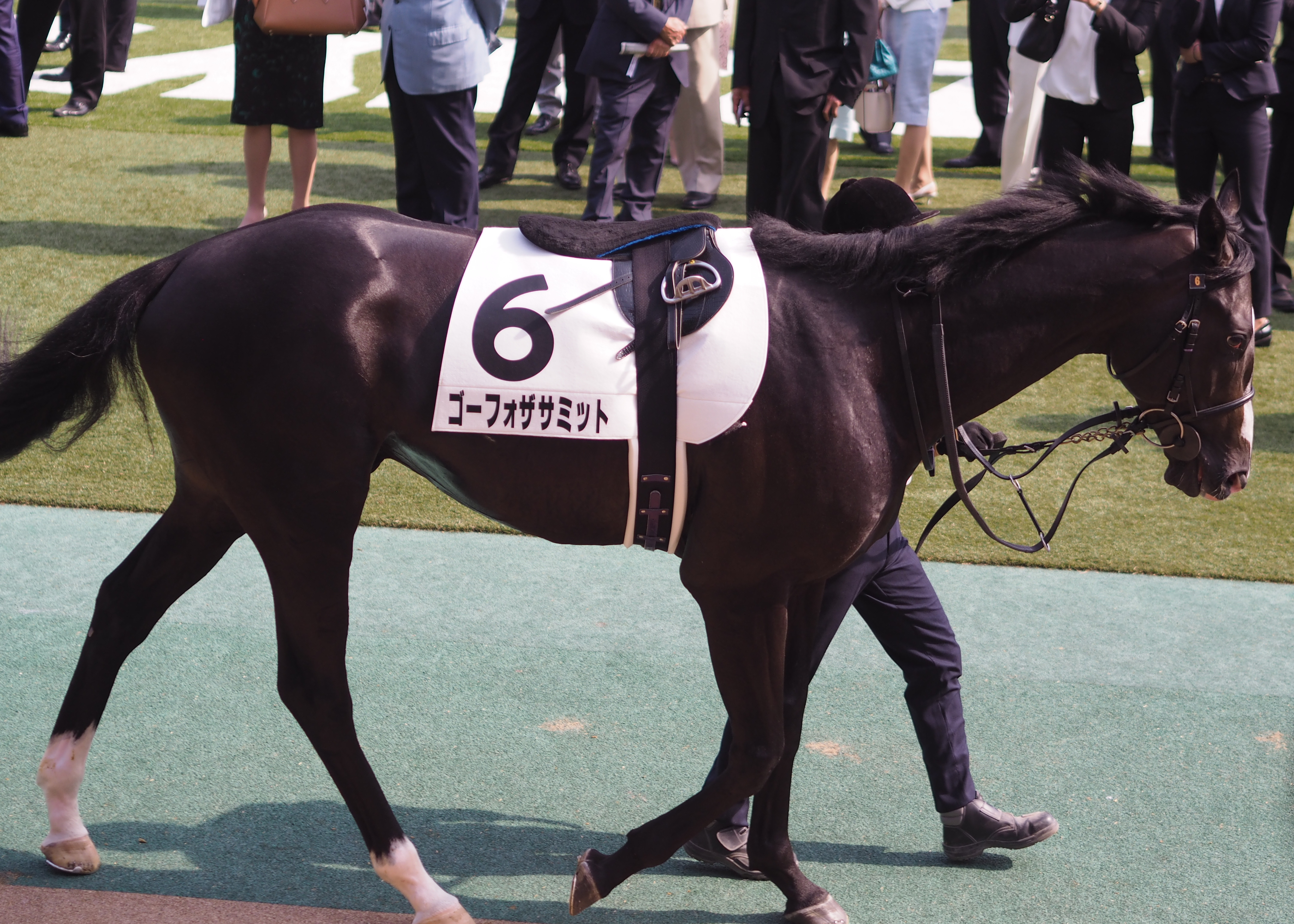 10R 東京優駿 日本ダービー